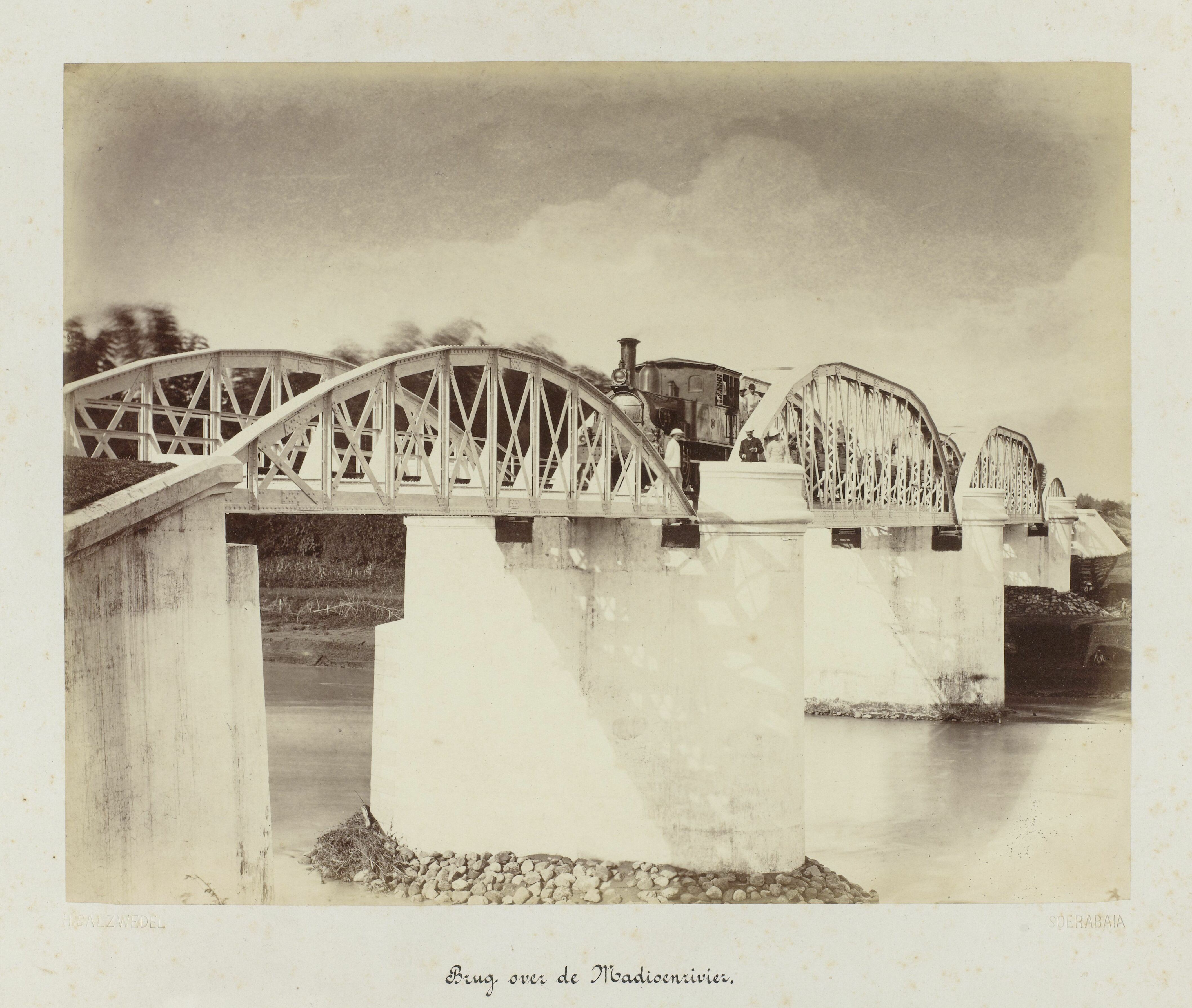 IdentificatieTitel(s): Brug over Madioenrivier (titel op object)Staatsspoorwegen op Java (serietitel)Objecttype: foto Objectnummer: NG-1988-26-20Omschrijving: Spoorbrug over Madiun (Madioen) rivier, op de brug een trein en enkele staande mannen. Onderdeel van een groep van 62 foto's in een doos met het opschrift "Staatsspoorwegen op Java" uit 1888.VervaardigingVervaardiger: fotograaf: Herman Salzwedel (vermeld op object)Plaats vervaardiging: SurabayaDatering: 1880 - 1888Fysieke kenmerken: albuminedrukMateriaal: fotopapier Techniek: albuminedrukAfmetingen: foto: h 215 mm × b 275 mmkarton: h 300 mm × b 370 mmOnderwerpWanneer: 1880 - 1888Waar: MadiunVerwerving en rechtenVerwerving: aankoop 30-aug-1988Copyright: Publiek domein